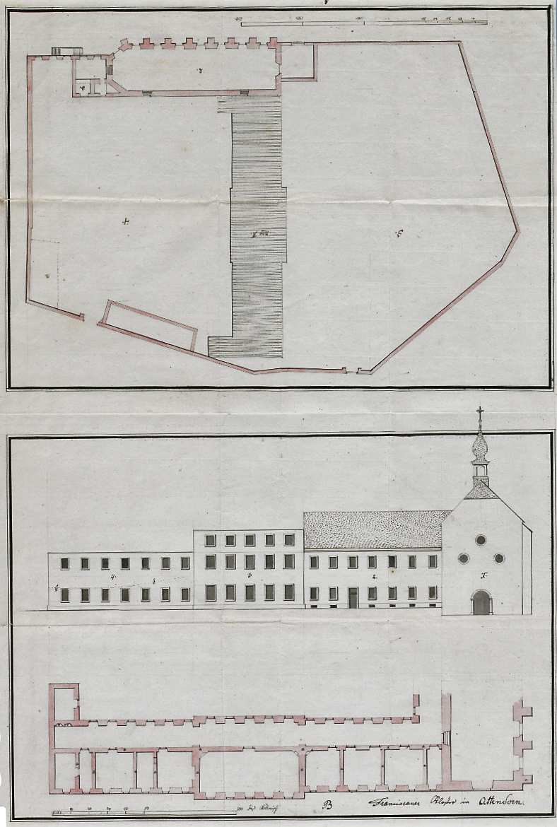 Attendorn, Franziskanerkirche, Lageplan, Ansicht und Grundriß, 1803. Beschreibung: „200 köln. Fuß = 19,4 cm; 100 köln. Fuß = 14,5 cm – 64 x 43 – kolorierte Zeichnung – Großherzogtum Hessen II A Nr. 160“.